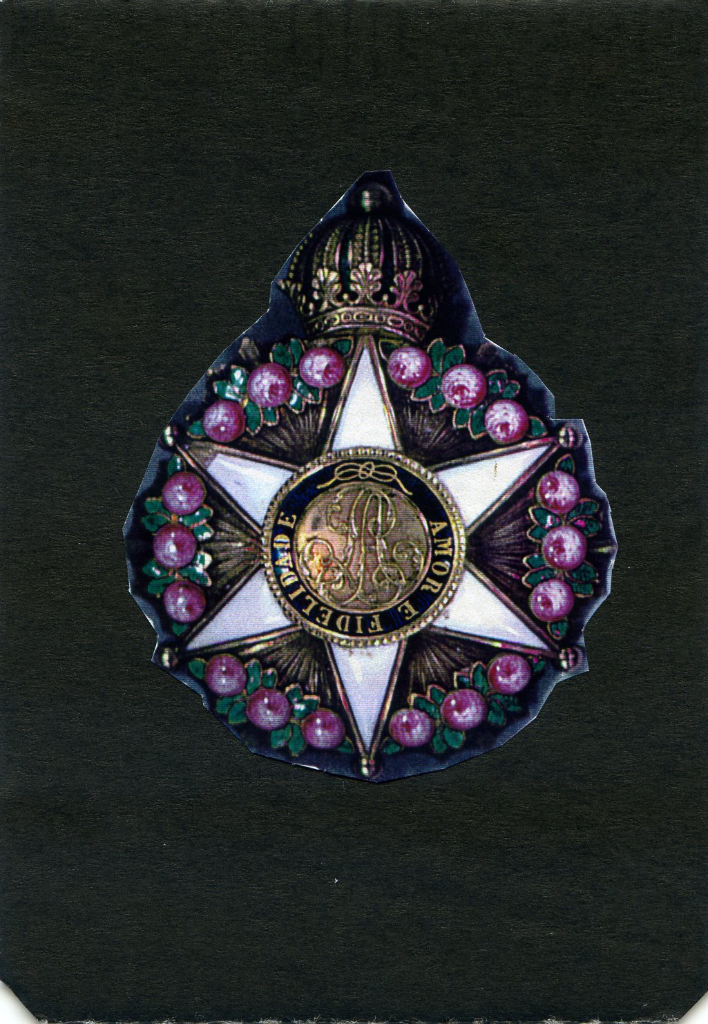 fundo preto com a comenda